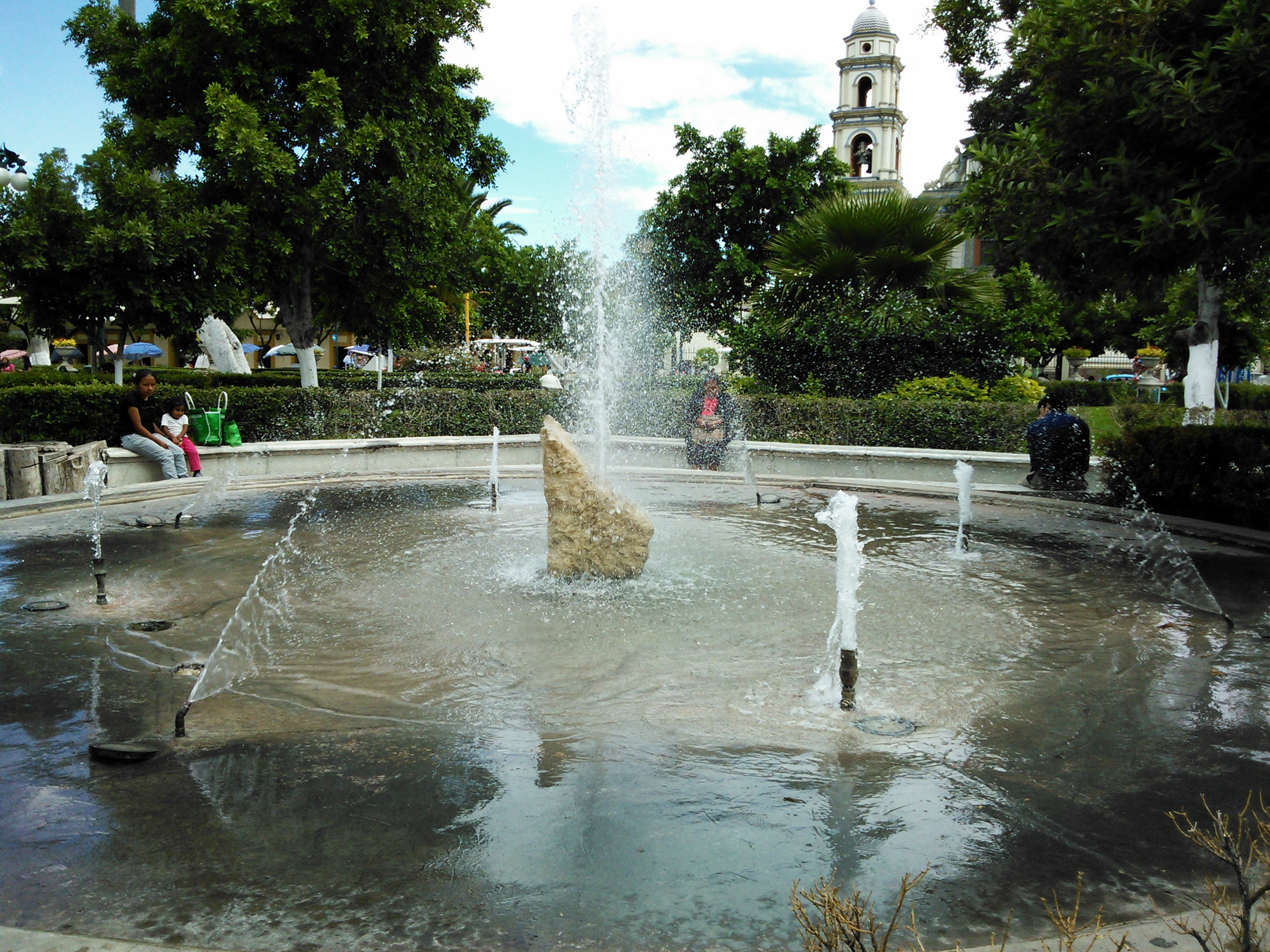 Parque Juarez (Zocalo de Tehuacan).